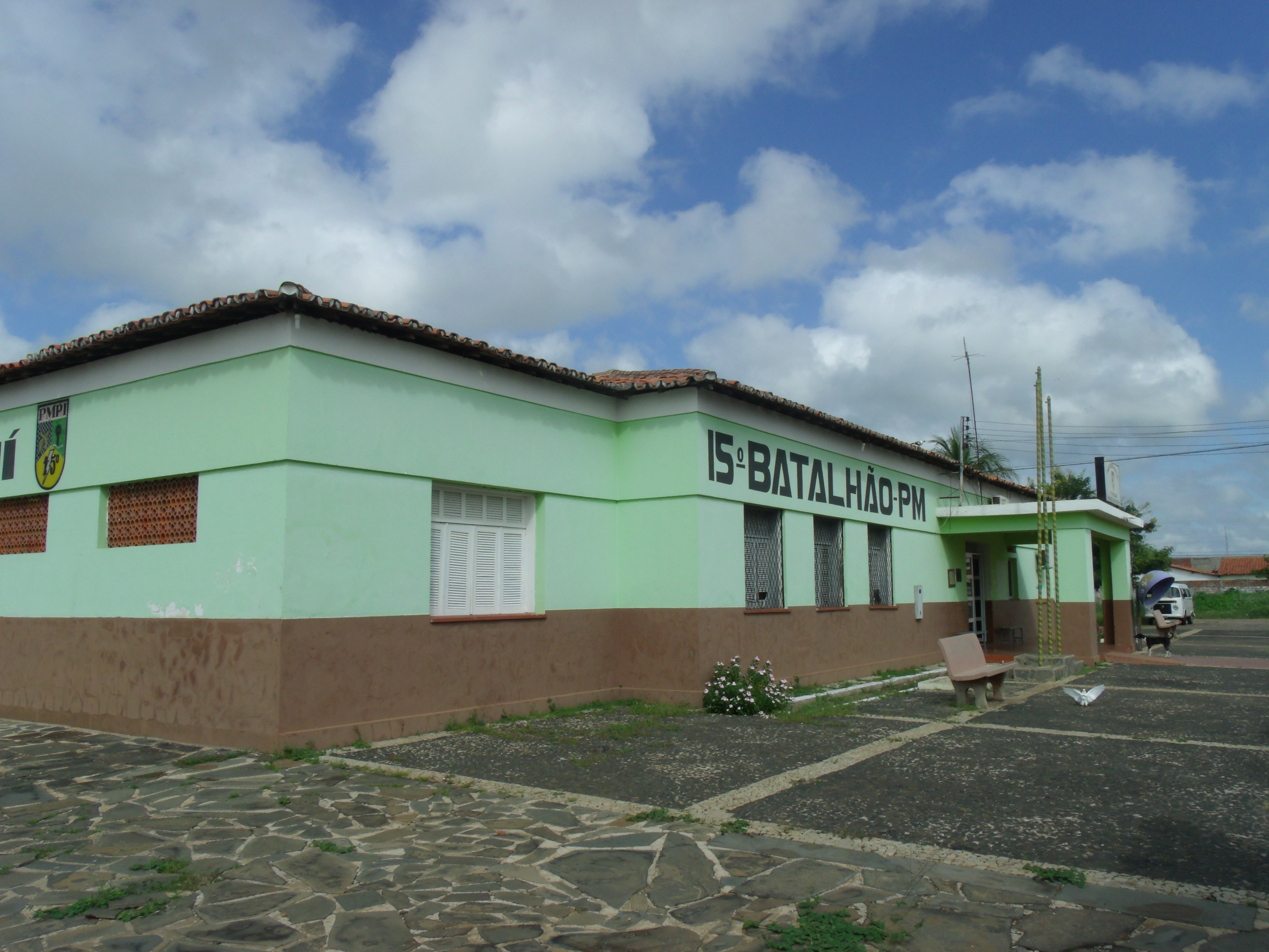 Vista da frente do 15º Batalhão de Polícia Militar do Piauí, o Quartel do Jenipapo.